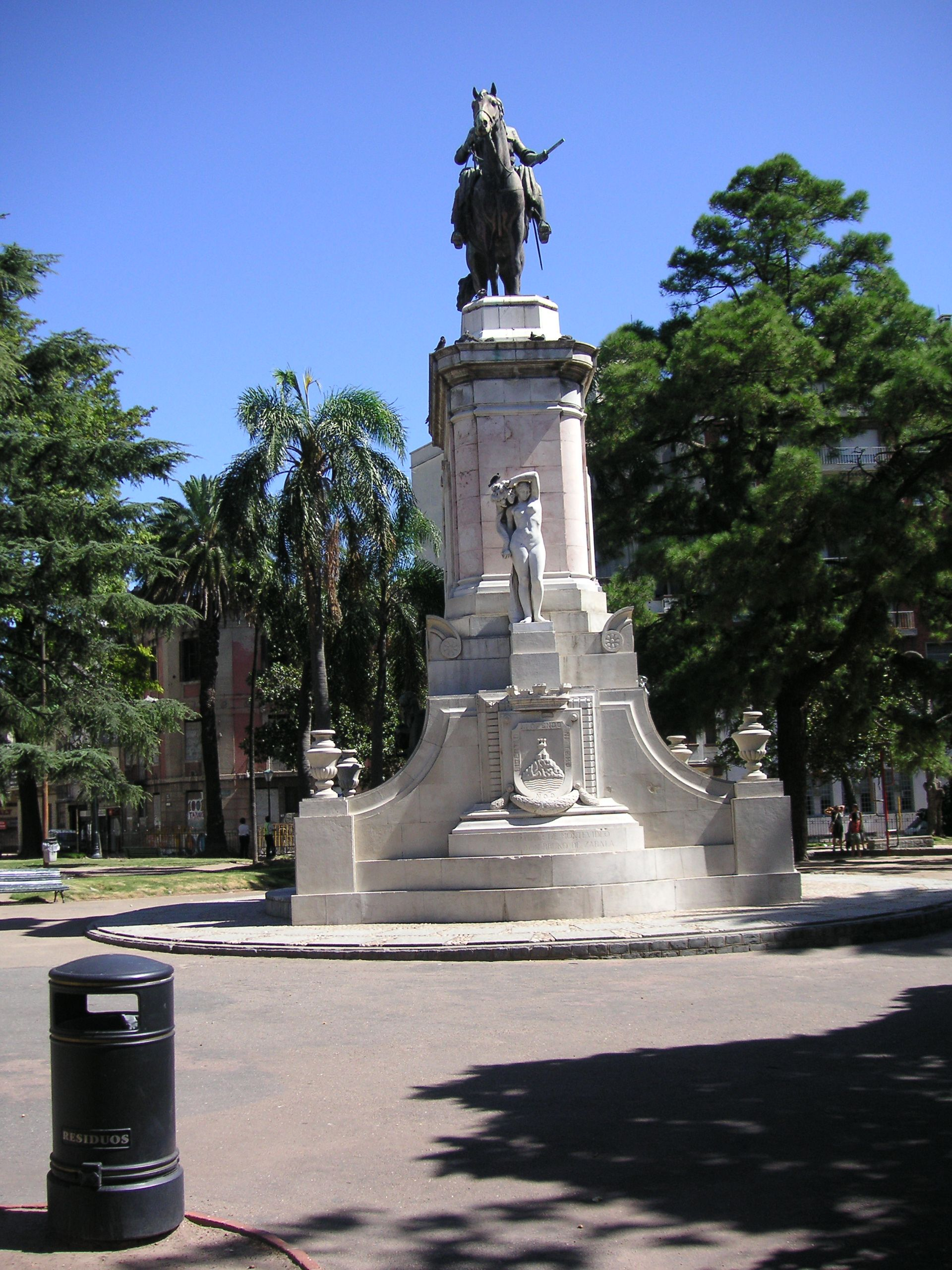 Zabala Square in Montevideo, Uruguay.